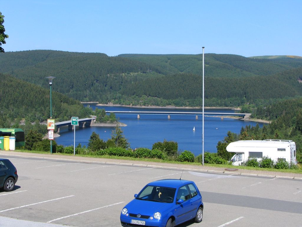 Die Okertalsperre vom neuen Schulenberg aus. Im Stausee unter den beiden Brücken lag bis 1954 das alte Schulenberg.